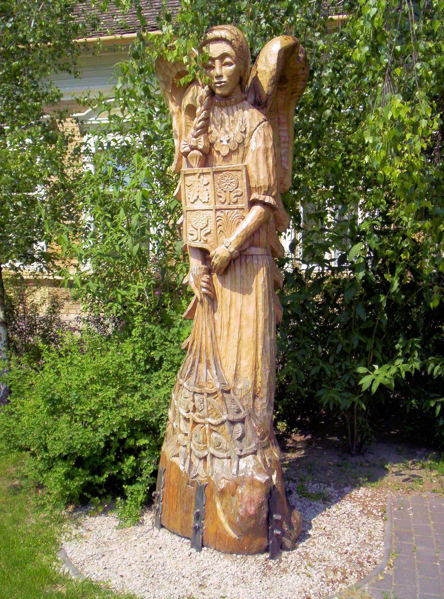 A Védőangyal-szobor Érsekcsanádon. Mónus György alkotása – – photo taken by uploader User:Csanády in 2006.